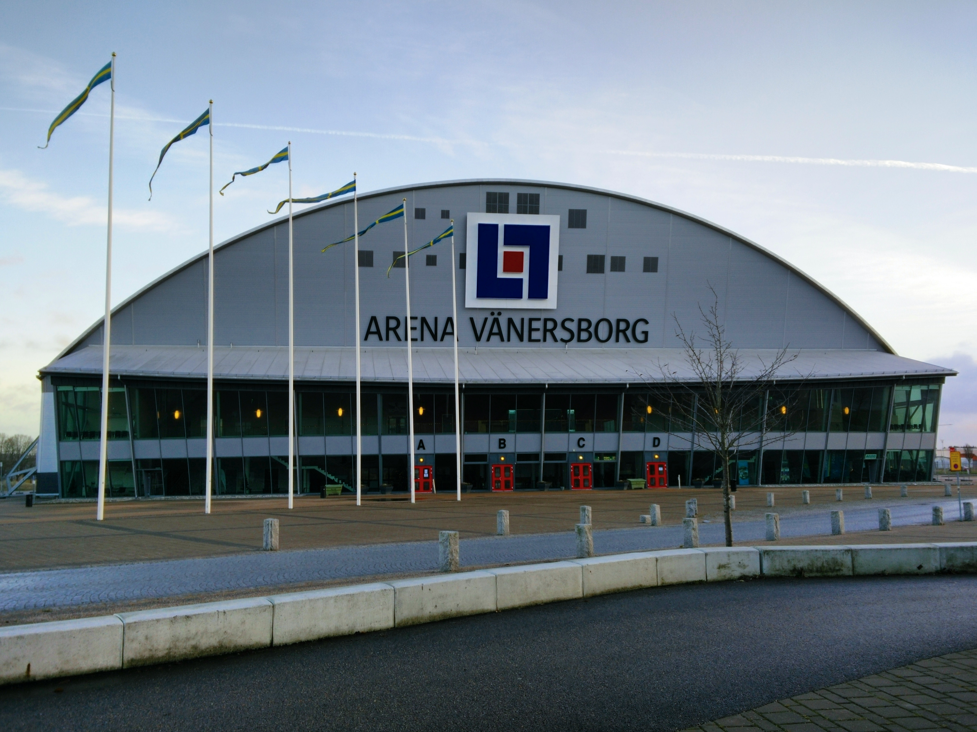 Arena Vänersborg, Vänersborgs bandyinomhusarena.